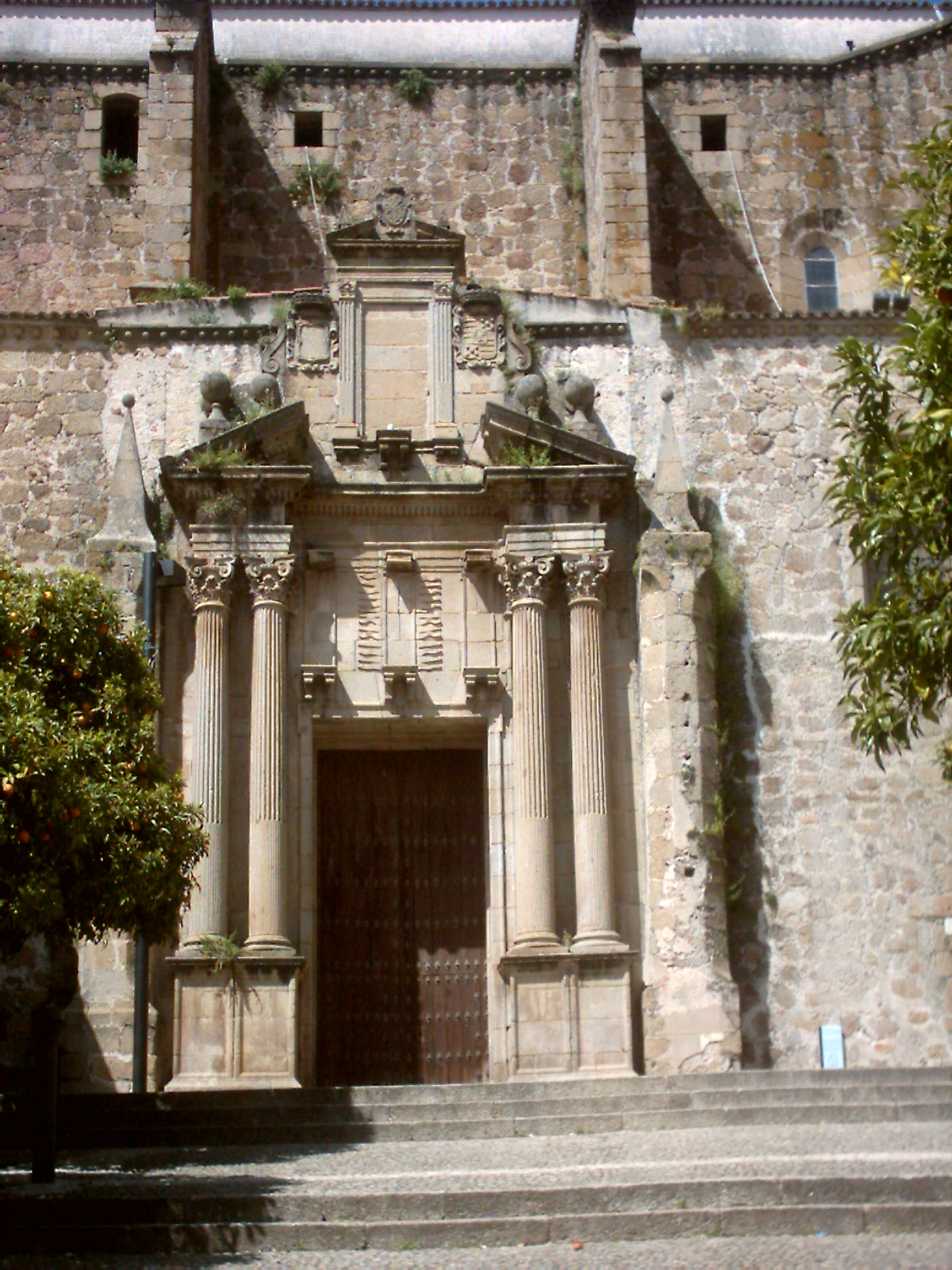 Fachada principal de la iglesia de Santo Domingo en Plasencia, Cáceres